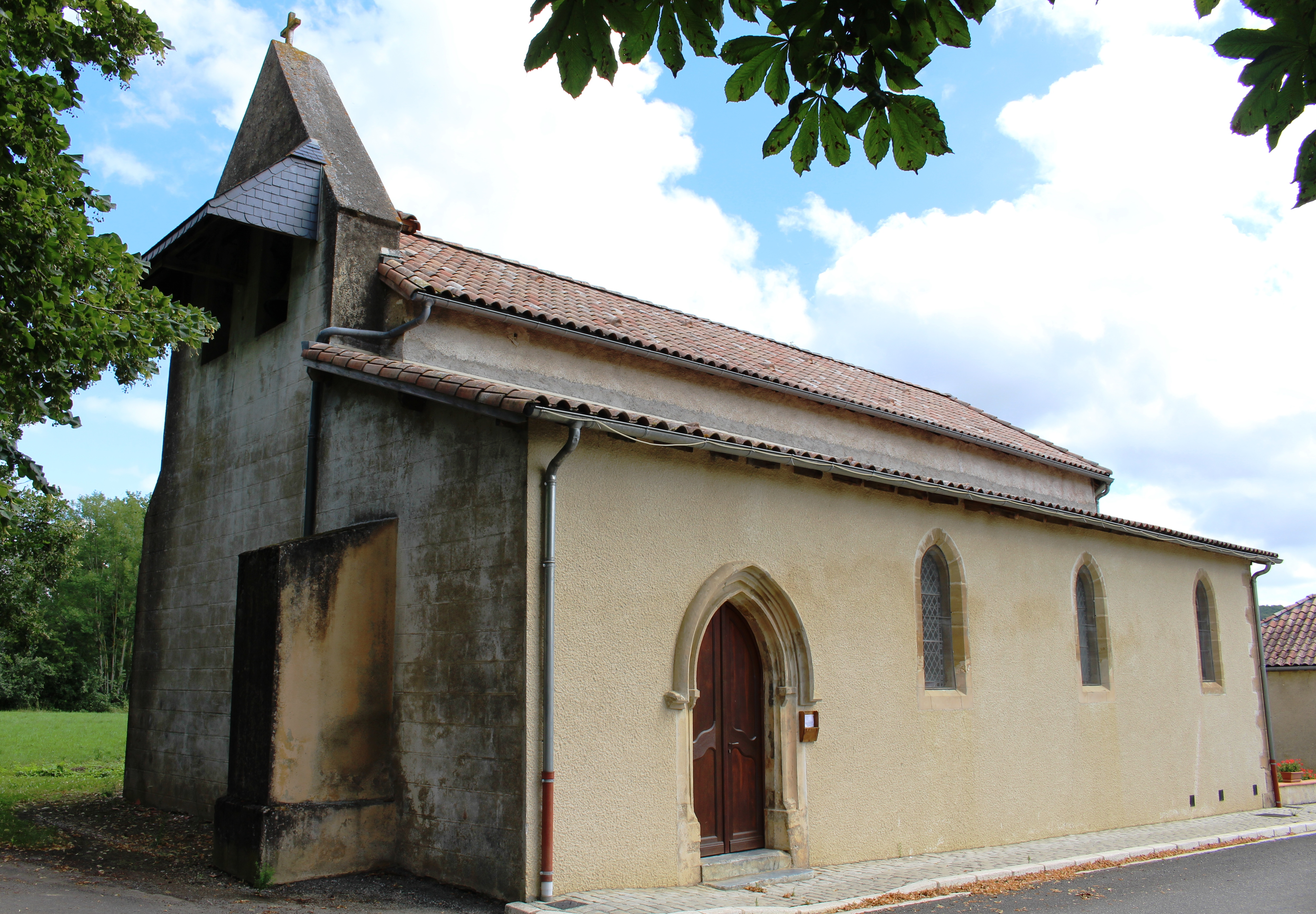 Église Saint-Martin de Devèze (Hautes-Pyrénées)